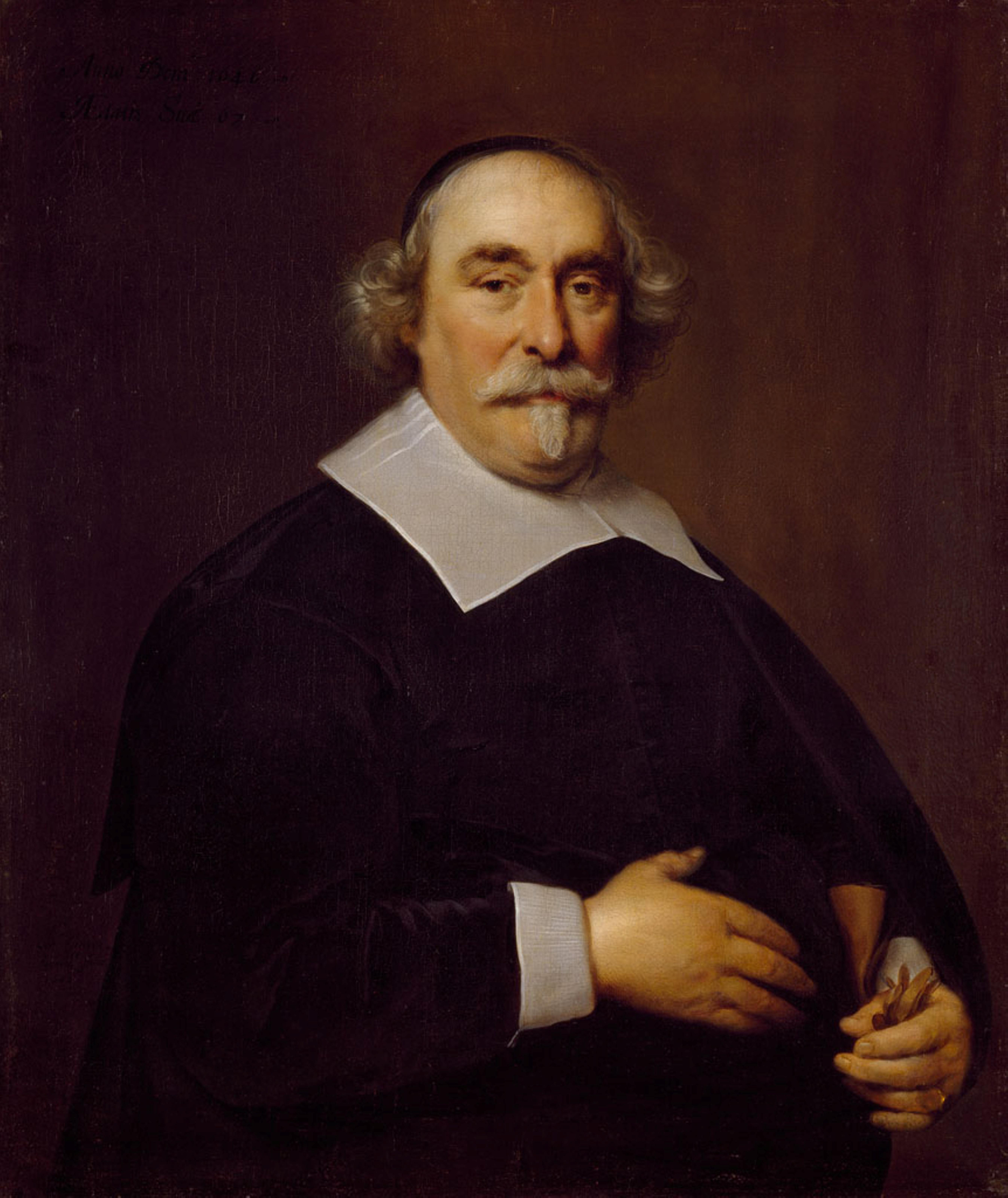 De koopman en reder Jan Corneliszn Geelvinck (1579-1651) was in 1646 voor de elfde keer tot burgemeester gekozen, toen hij zich liet portretteren. Zijn tweede huwelijk, met Agatha de Vlaming van Oudtshoorn, verschafte Geelvinck toegang tot het stedelijk patriciaat. In totaal bekleedde Geelvinck het burgemeesters ambt twaalfmaal. Ook was hij vertegenwoordiger van Holland in de Staten Generaal.